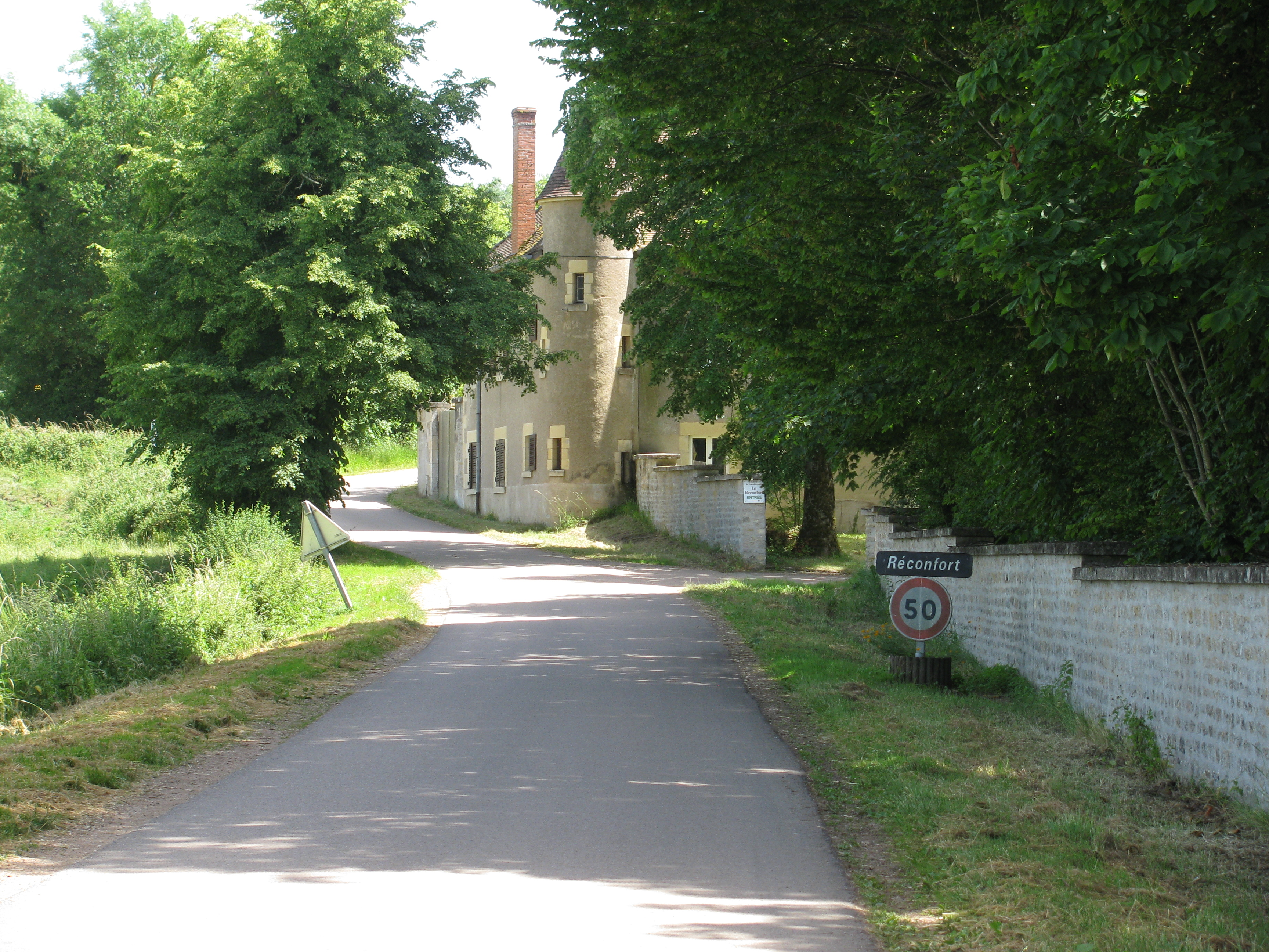 Ancienne abbaye de Réconfort, puis Château de Réconfort, aujourd'hui, Centre de convalescence de Réconfort.